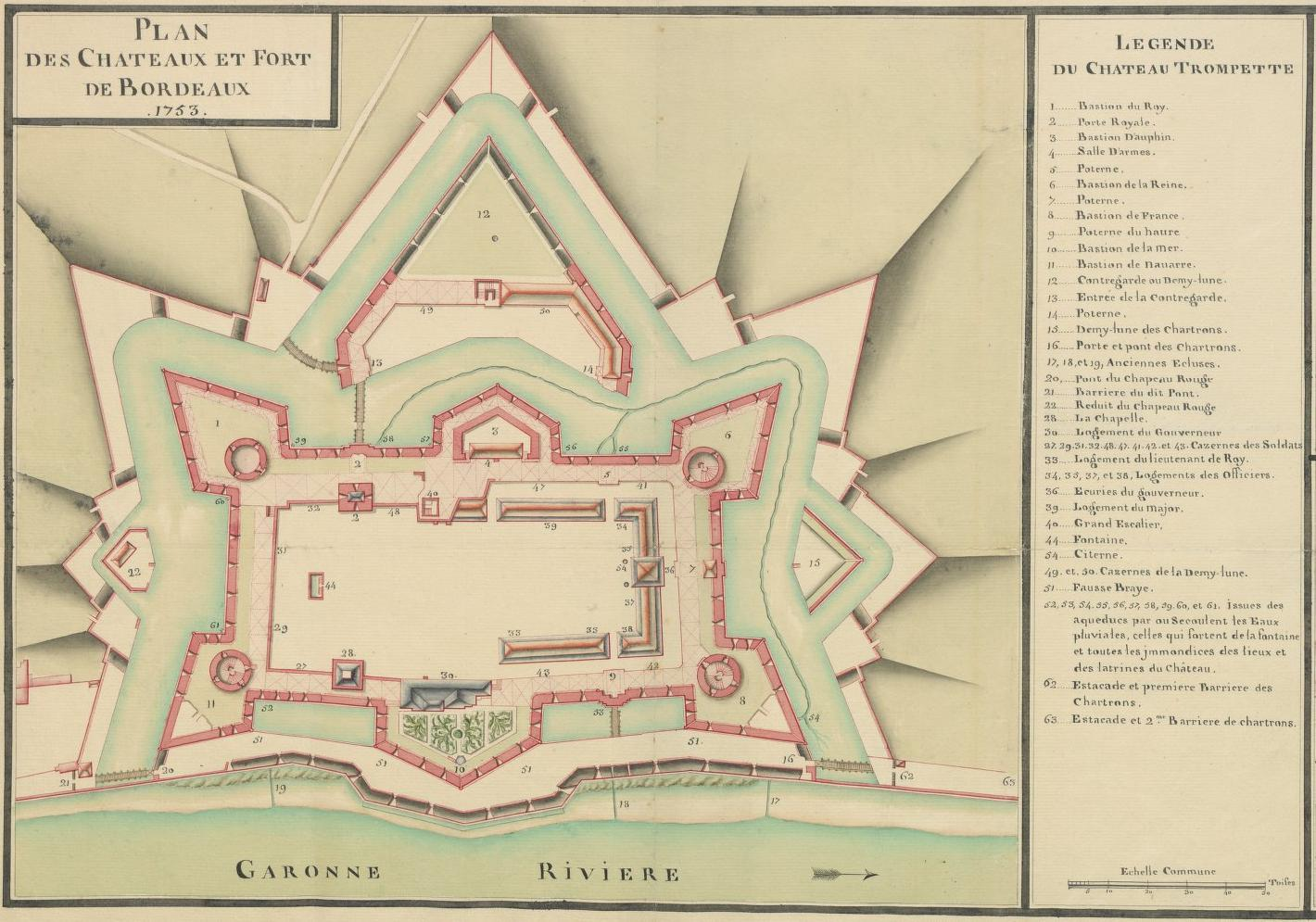 Bordeaux, Gironde (France). Plan du Château Trompette en 1753, d'un "Plan des châteaux et forts de Bordeaux en 1753", par Touros; plan manuscrit aquarellé (35,5 X 75 cm) ayant appartenu à la collection d' Antoine-René de Voyer, marquis de Paulmy puis d'Argenson (1722-1787).